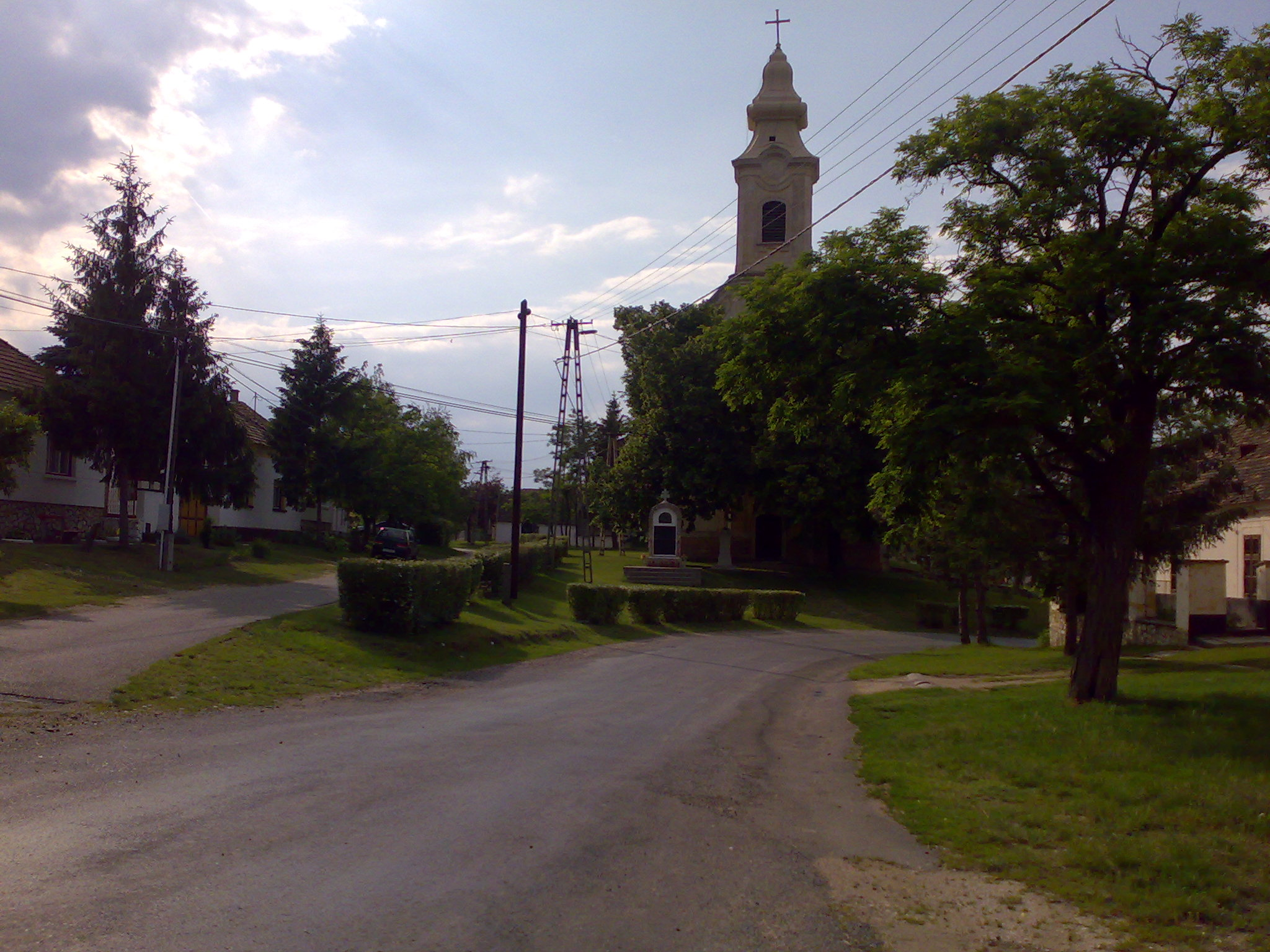 Bakonyszűcs Nagyboldogasszony templom